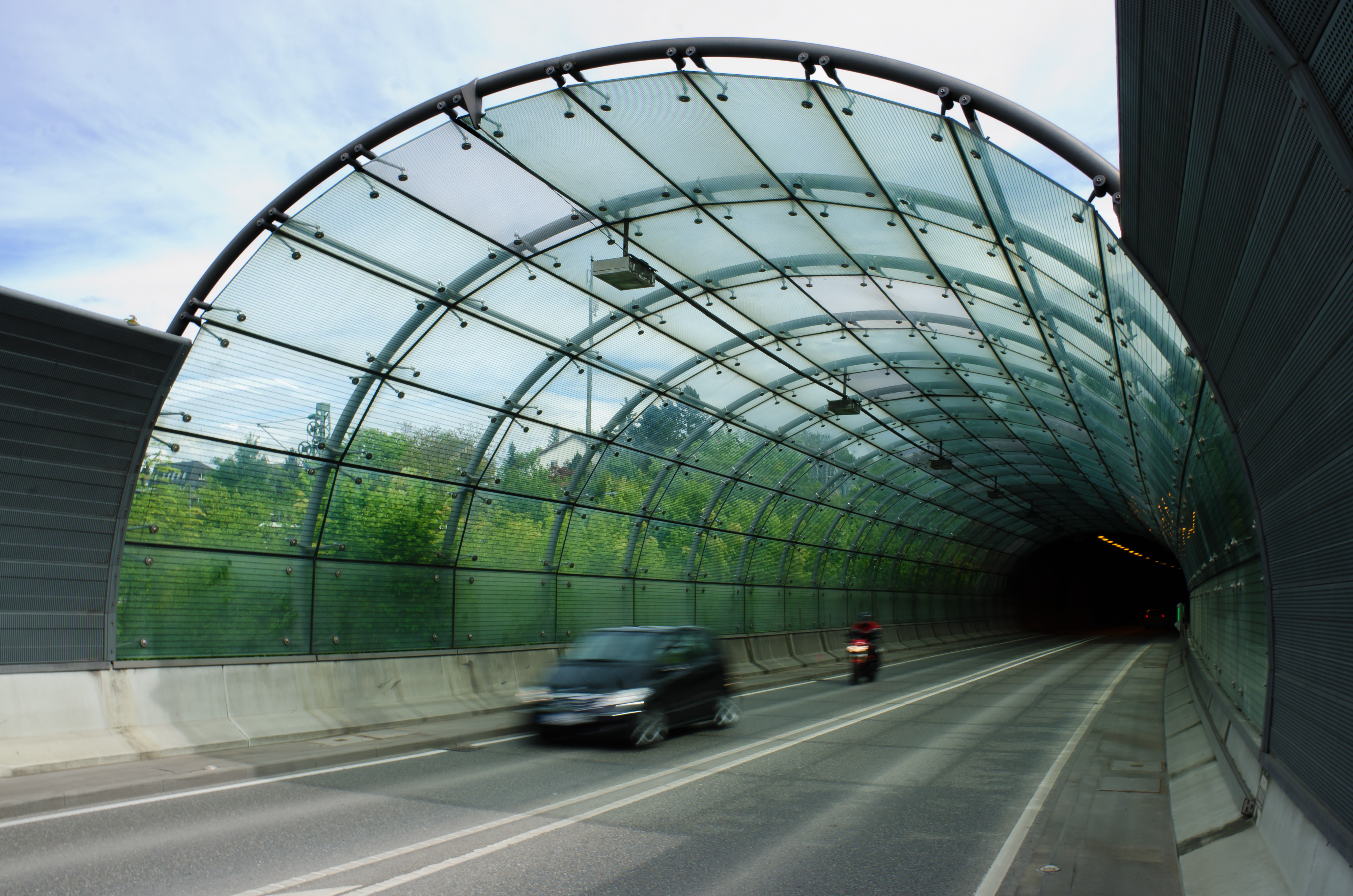 Nord-Süd-Straße Stuttgart-Vaihingen, nördliches Portal des Österfeldtunnels